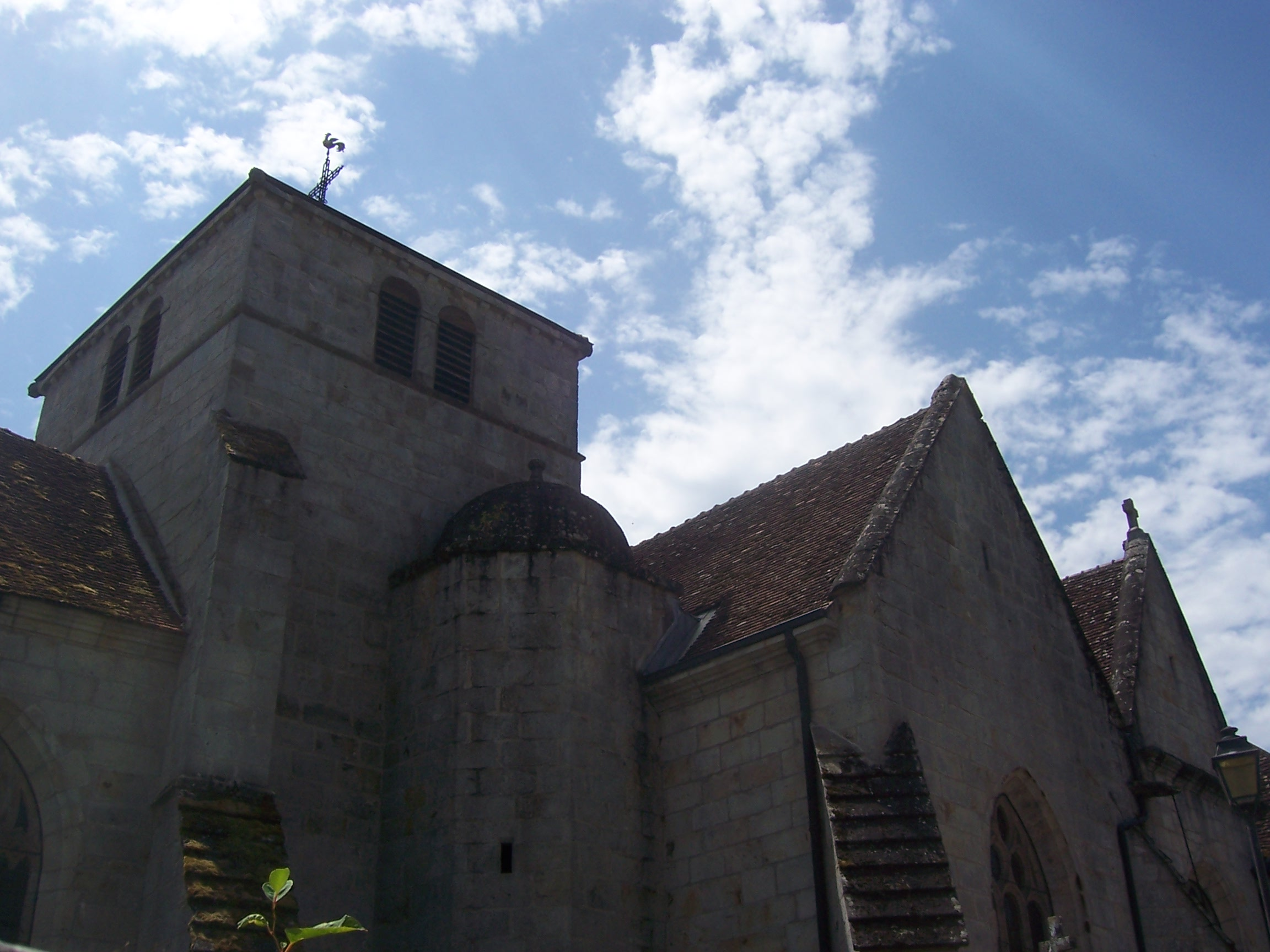 Eglise de La Guiche